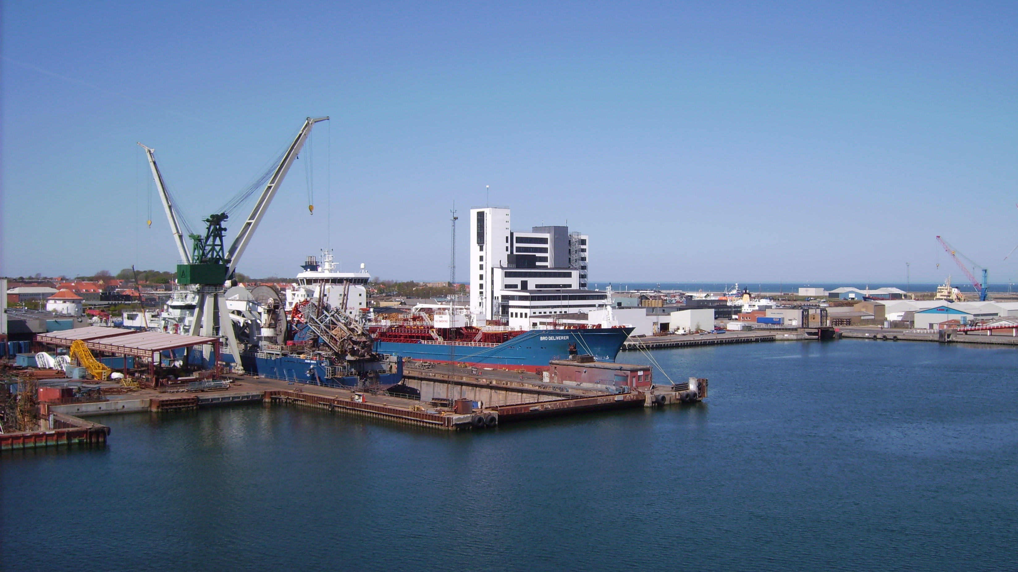 The town Frederikshavn (Fredrikshamn) in Denmark.